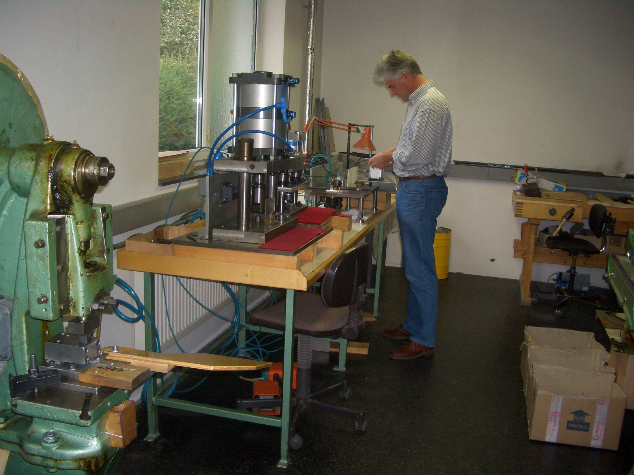 Müller-Werksführung